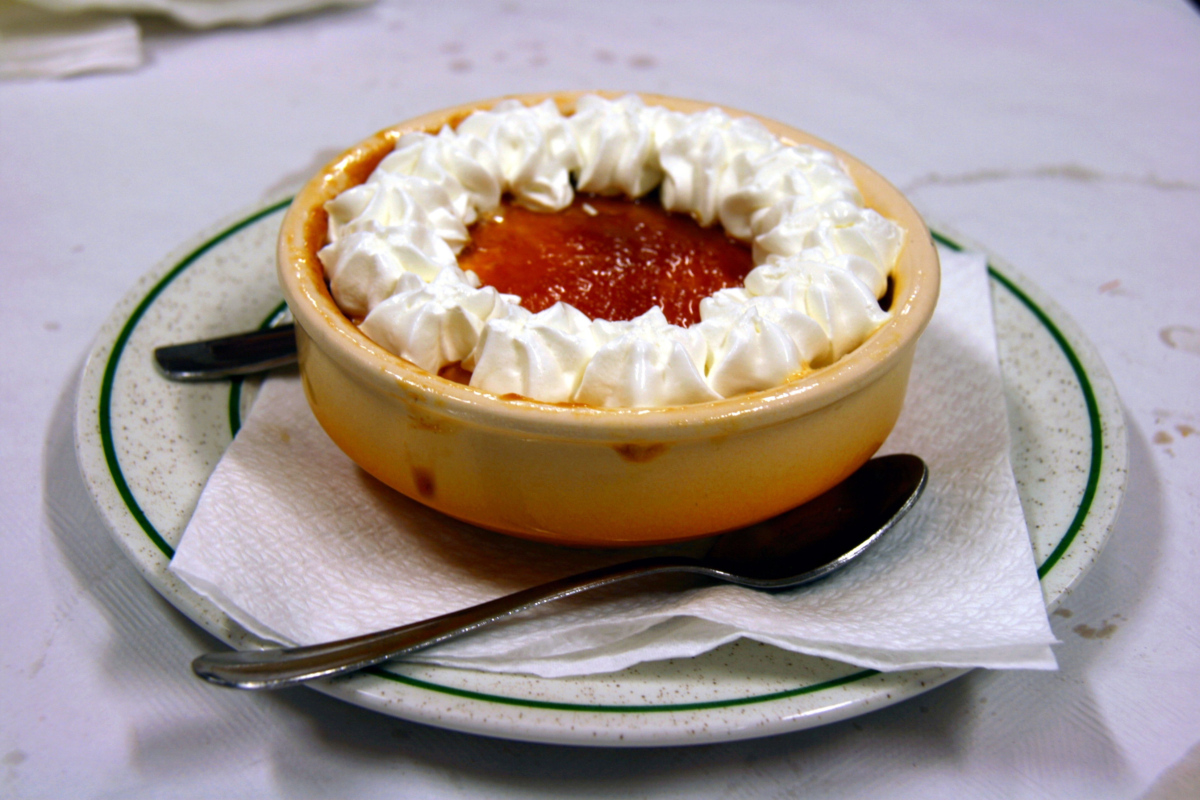 Tarta de whiskey